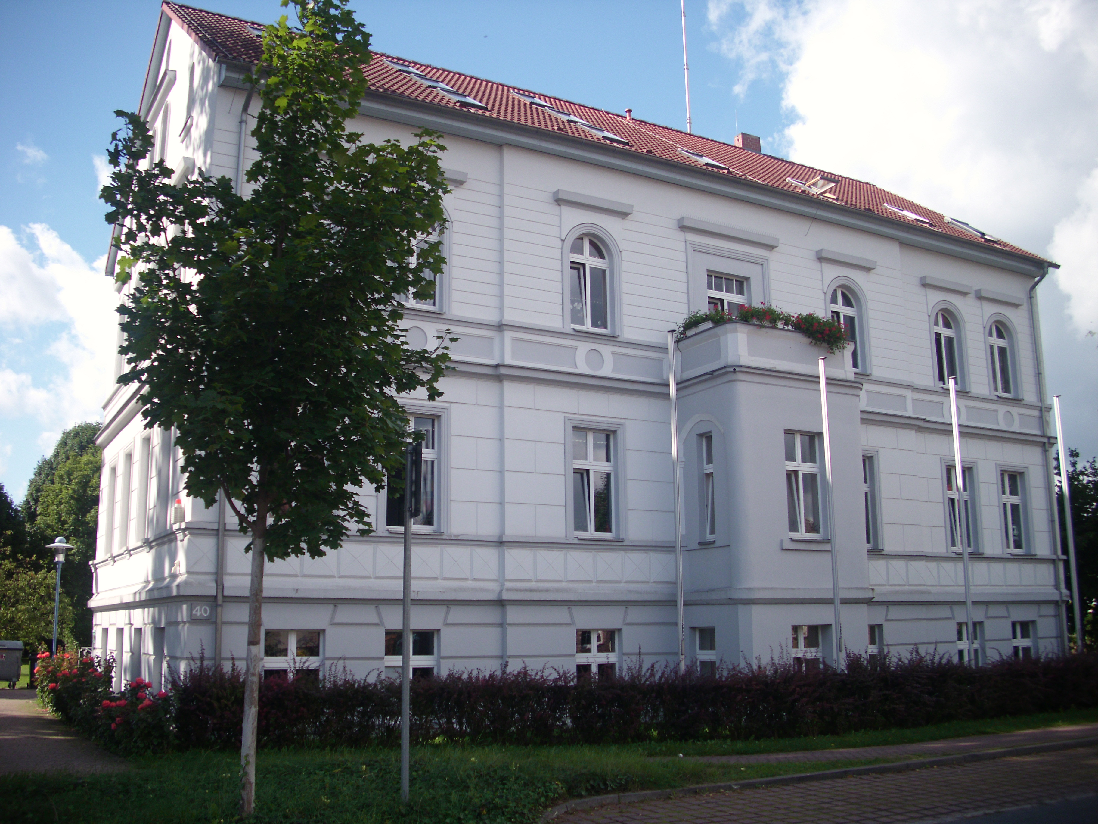 Gebäude des Amtes Schlaubetal, Müllrose, Brandenburg. Die ehemalige Villa Tusculum (tusculum, lateinisch für etwas Weihrauch, wird frei übersetzt als behaglicher Wohnsitz oder Lieblingsaufenthalt). Bei der Renovierung des Gebäudes im Jahre 2000 wurde die ursprüngliche Fassade erhalten.